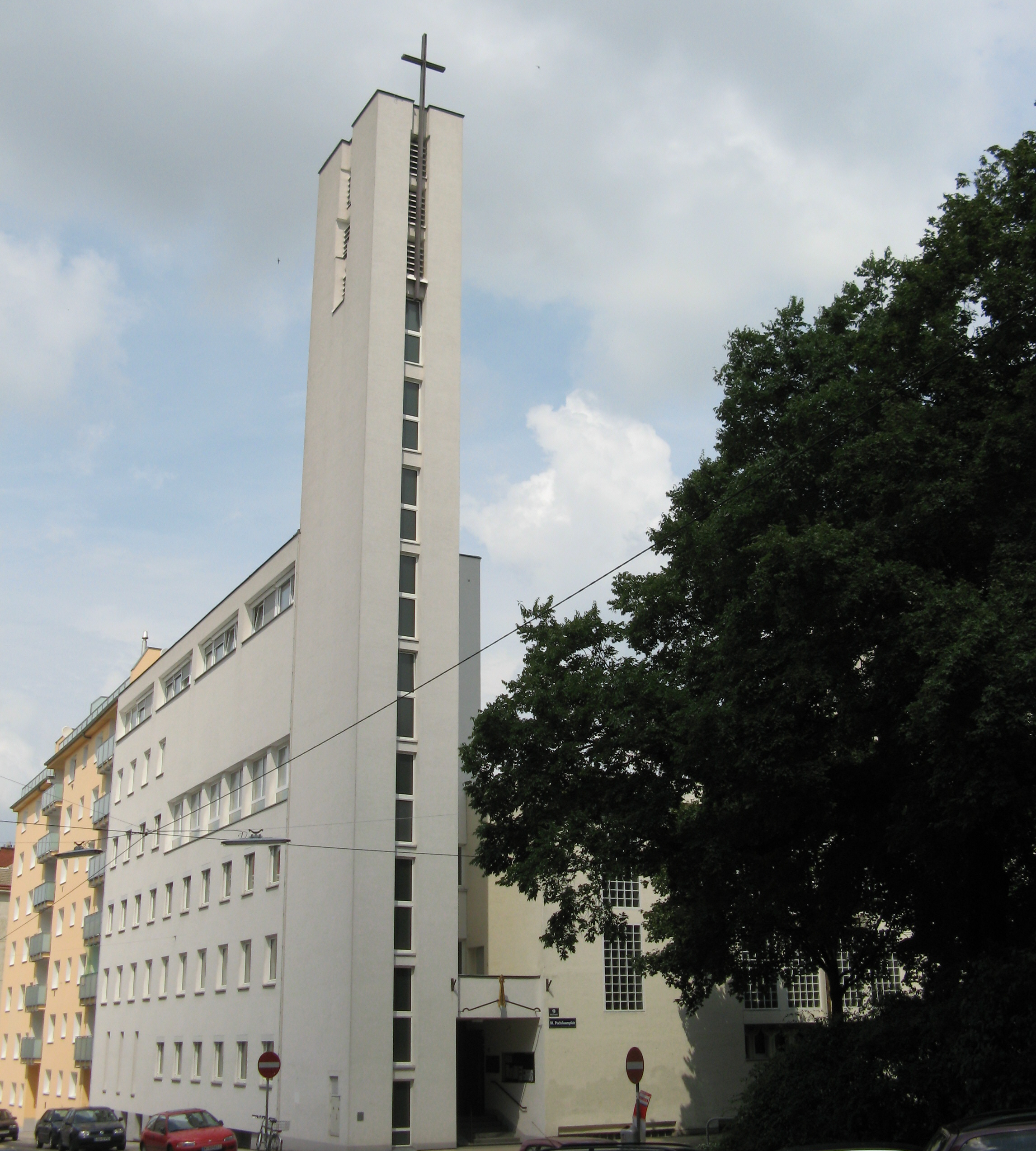 Pfarrkirche zur hl. Familie (1965/66) von Clemens Holzmeister, Puchsbaumplatz 9, Wien-Favoriten